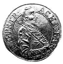 Acațiu Barcsay (în maghiară Ákos Barcsay) (n. 1619 - d. 1661) a fost principe al Transilvaniei între 1658-1660.